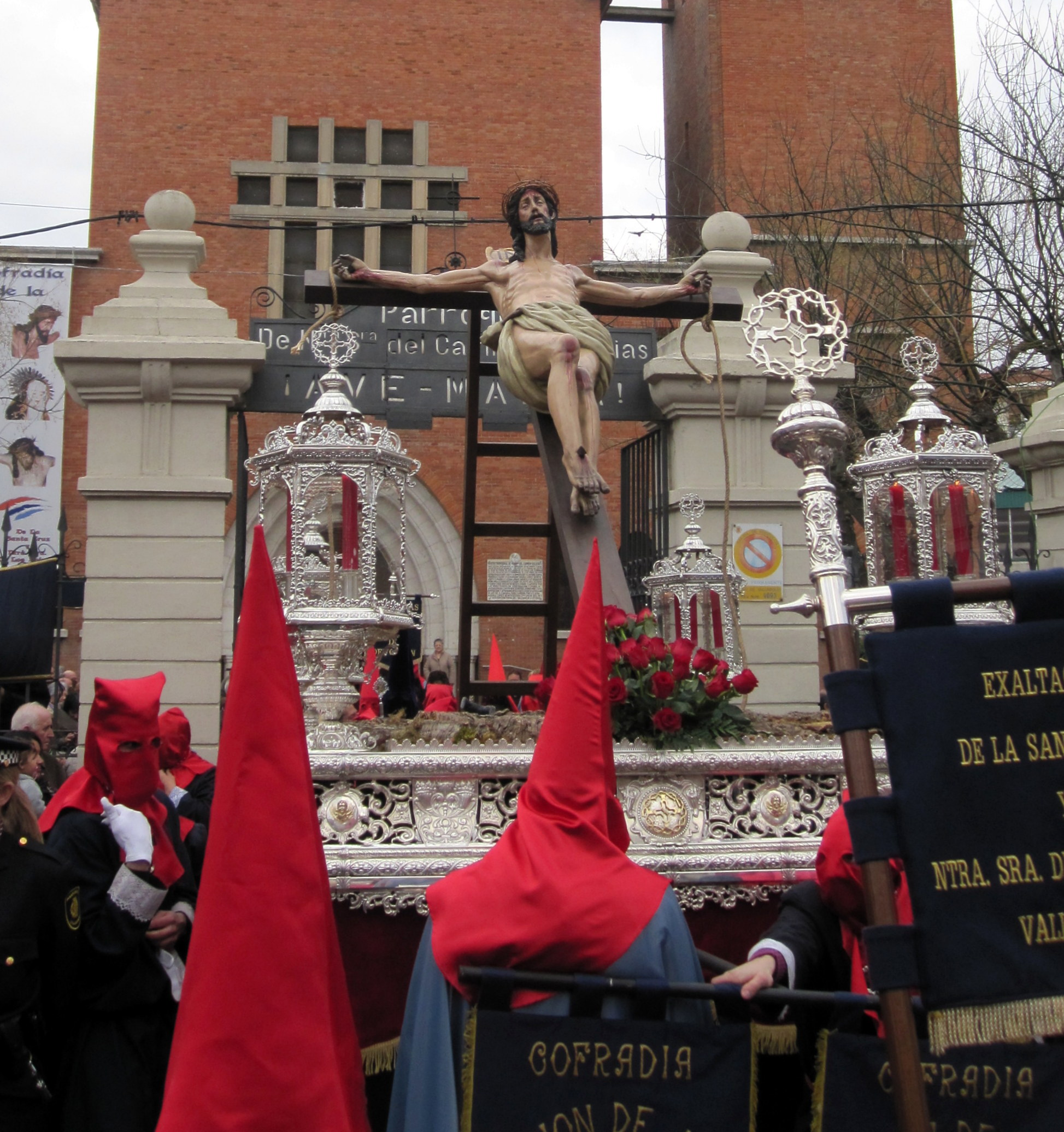 El Santísimo Cristo de la Exaltación, obra de Francisco Fernández e hijo, saliendo de la Iglesia del Carmen de Valladolid.